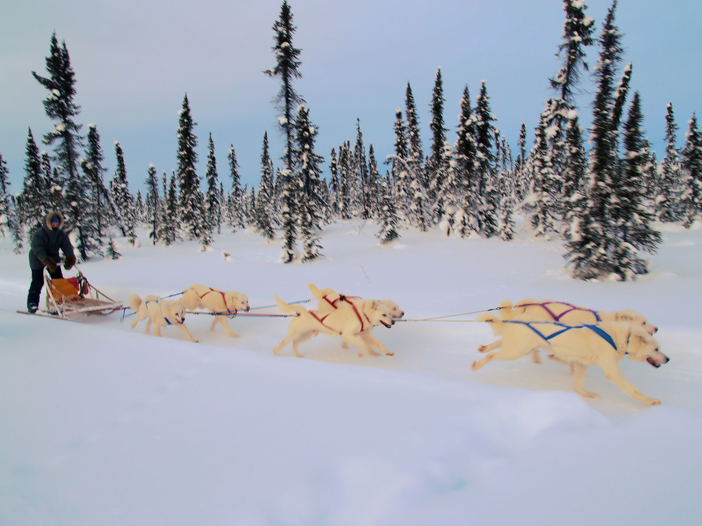 White huskies hiking in Inuvik, Canada.